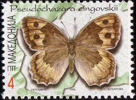 Pseudochazara cingovskii